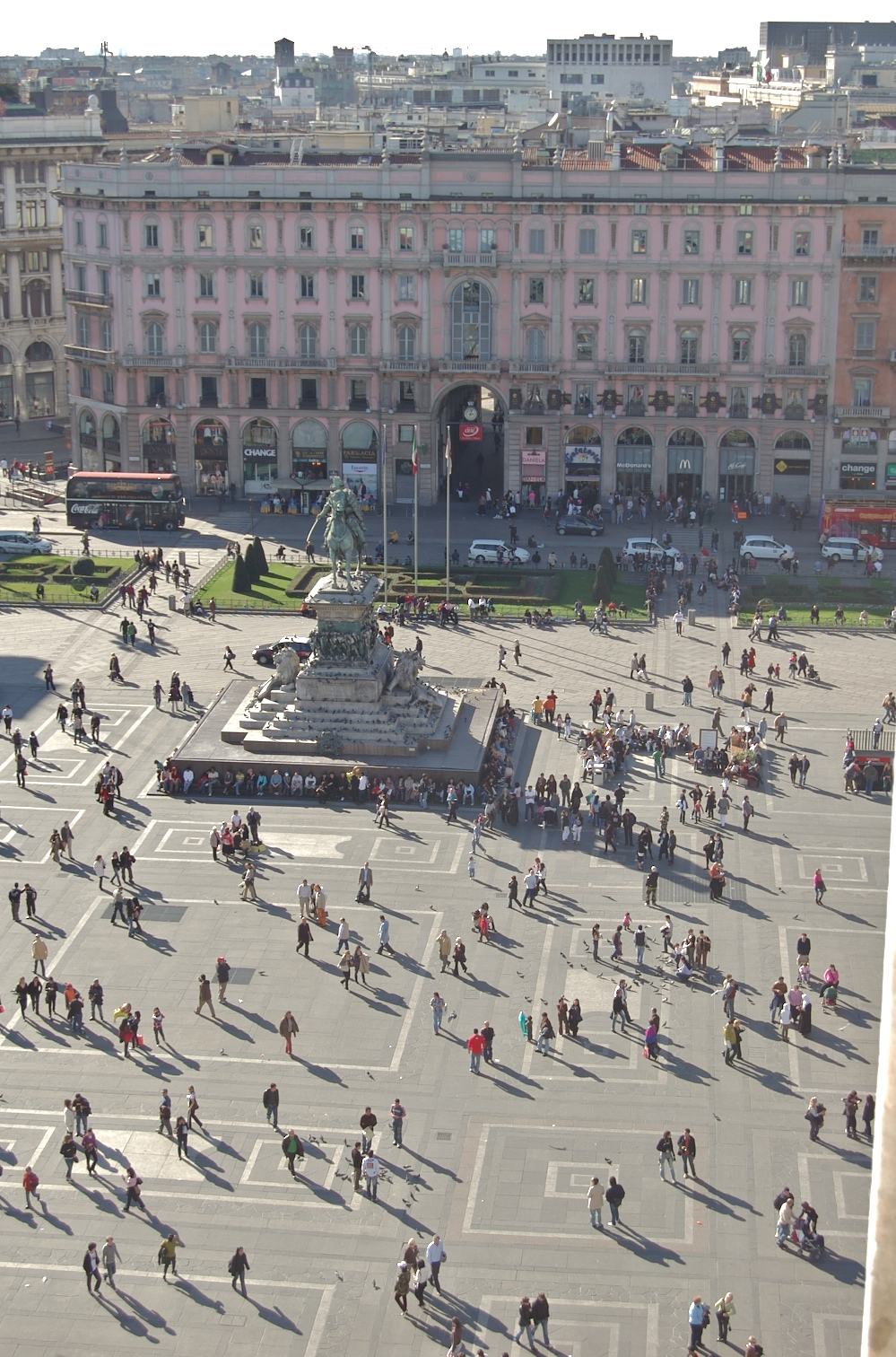 Piazza Duomo a Milano, con la facciata di Palazzo Carminati e il monumento a Vittorio Emanuele II, dall'alto del Duomo.